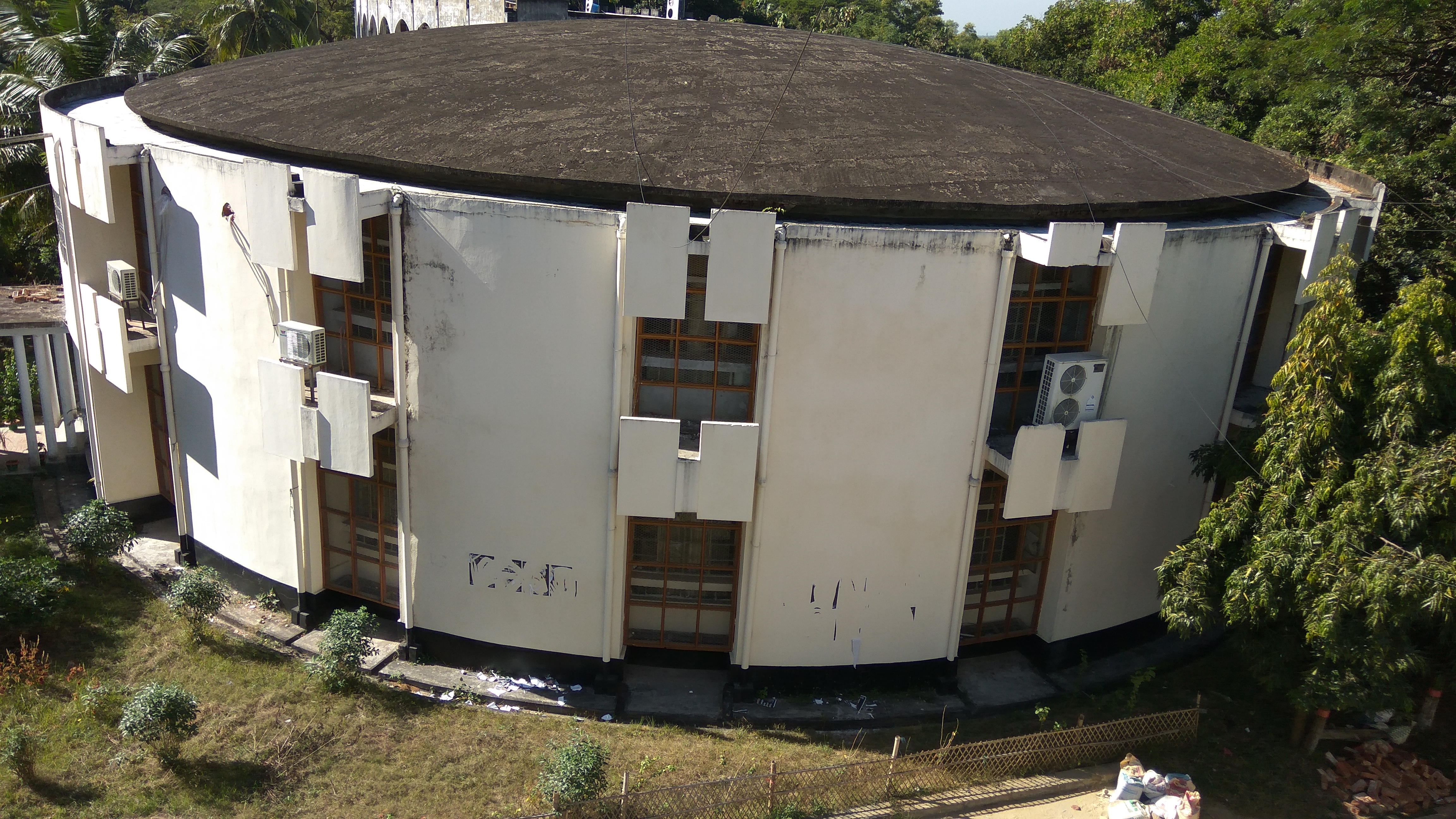 চুয়েটের পুরনো গ্রন্থাগার